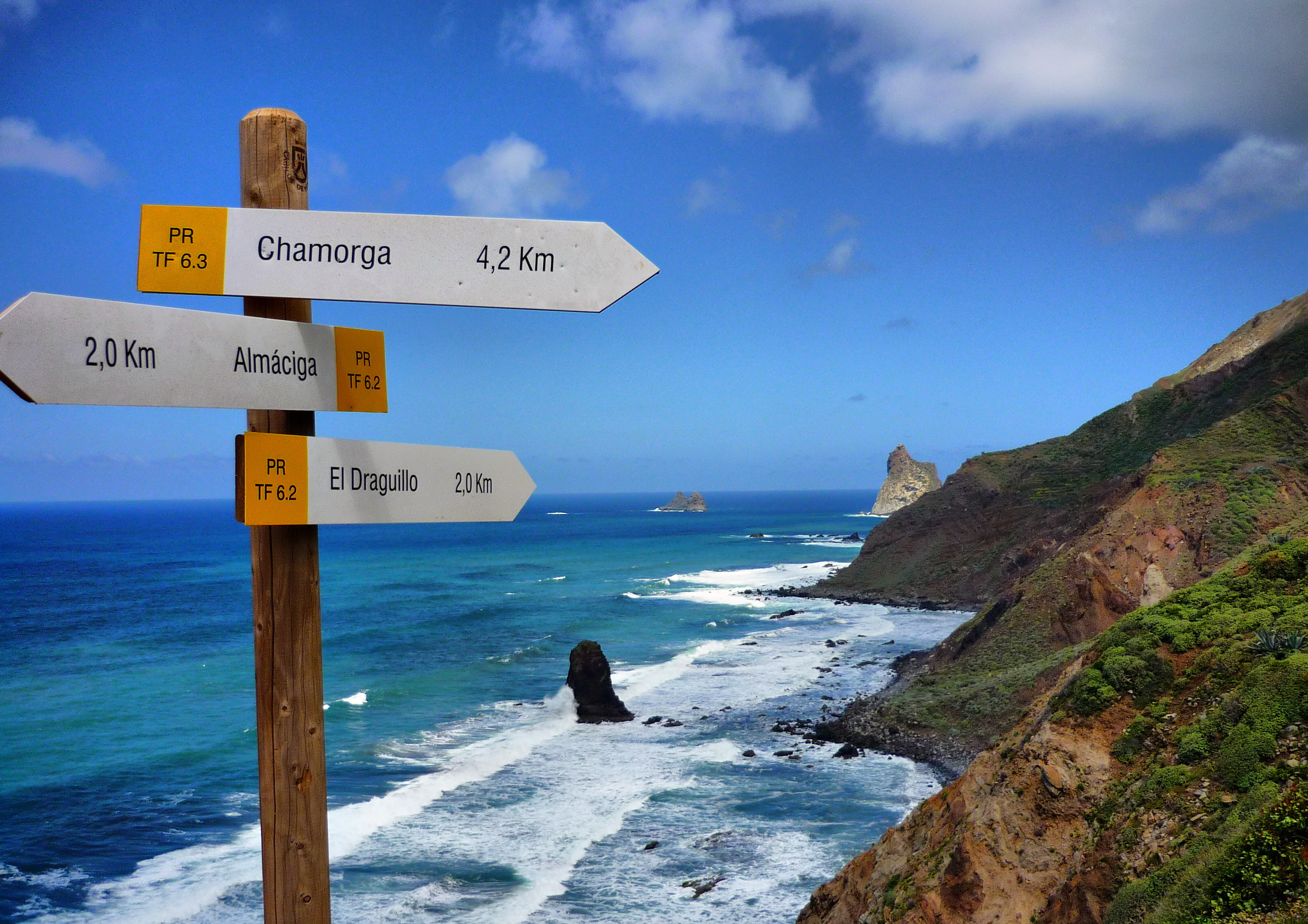 Poste informativo de los sendero que pasan por el caserío de Benijo, sobre la playa. Al fondo los Roques de Anaga